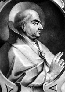 Pope Martin I